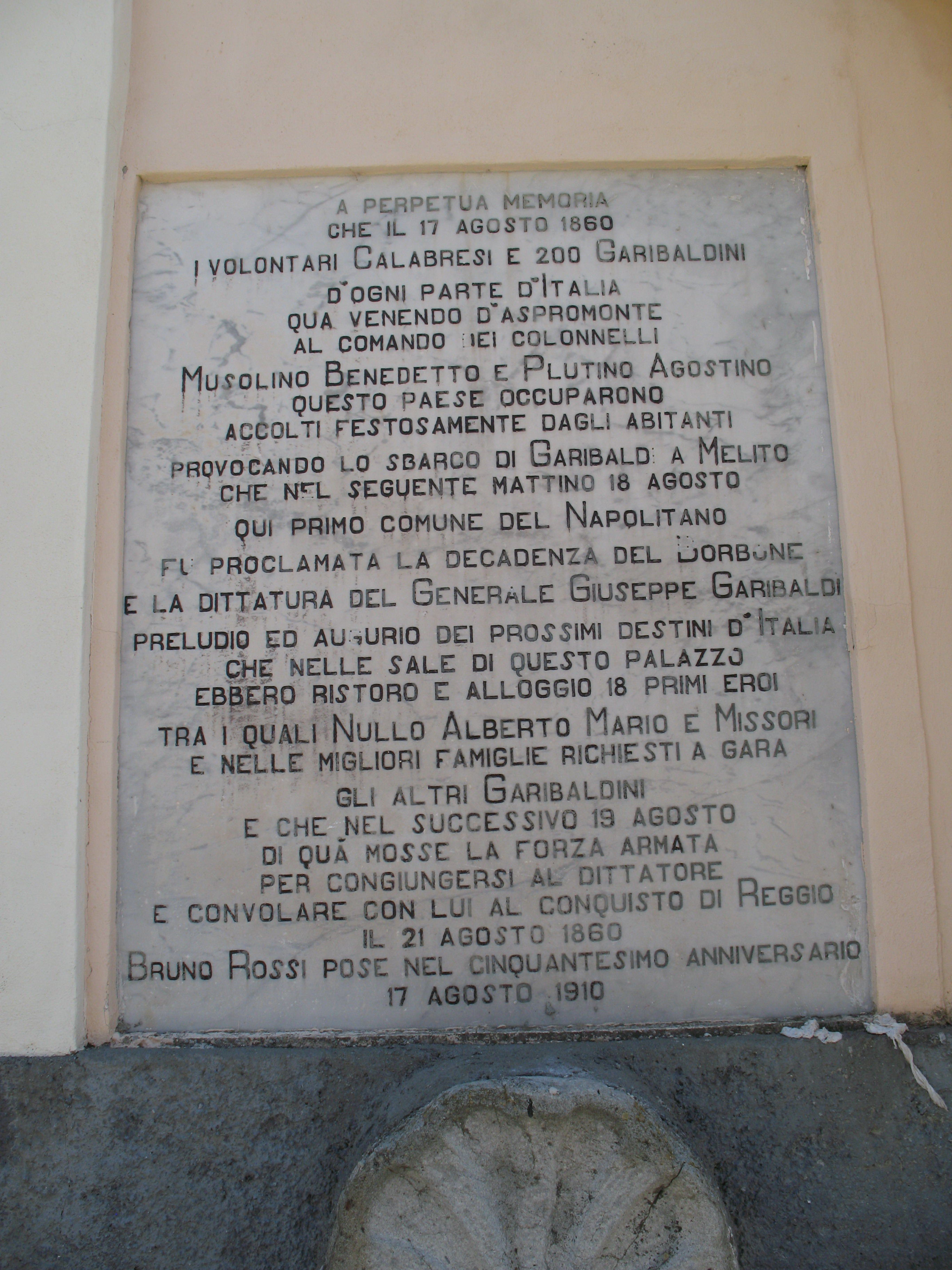 San Lorenzo, lapide dedicata ai volontari italiani comandati da Benedetto Musolino e Agostino Plutino.